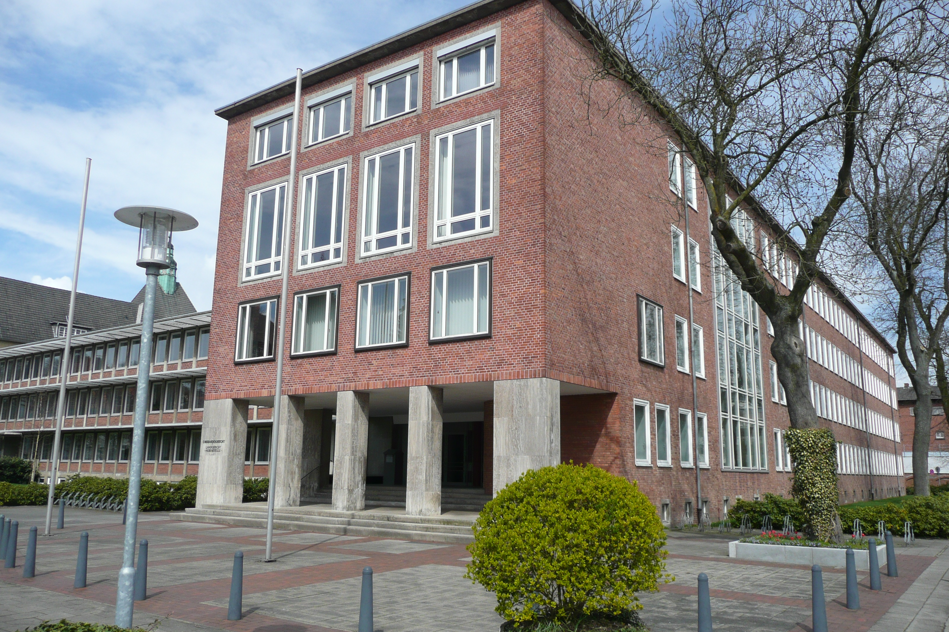 Gebäude des Oberlandesgerichts Oldenburg